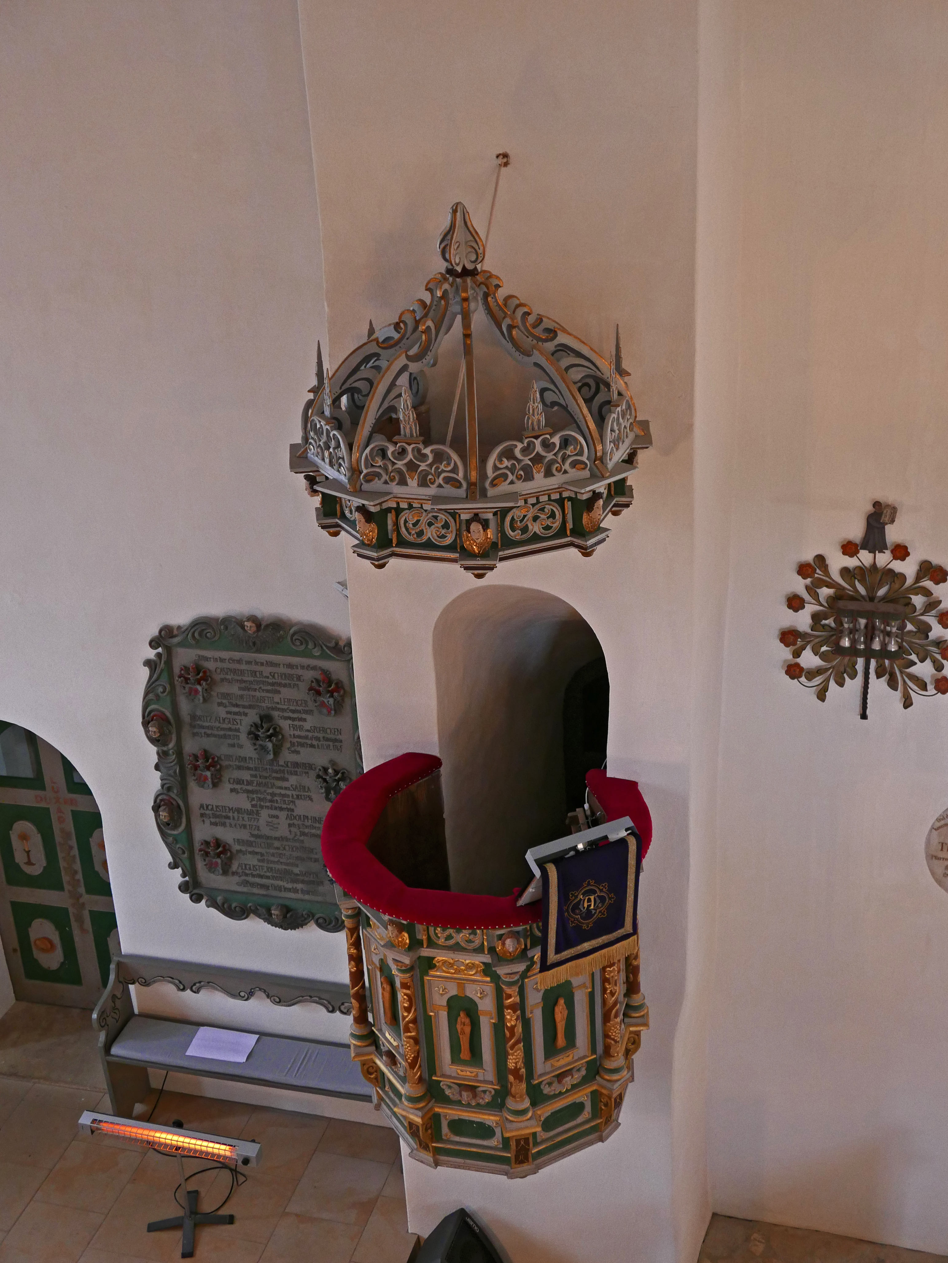 Kirche St Georg Pfaffroda : Schwalbennestkanzel (1671)